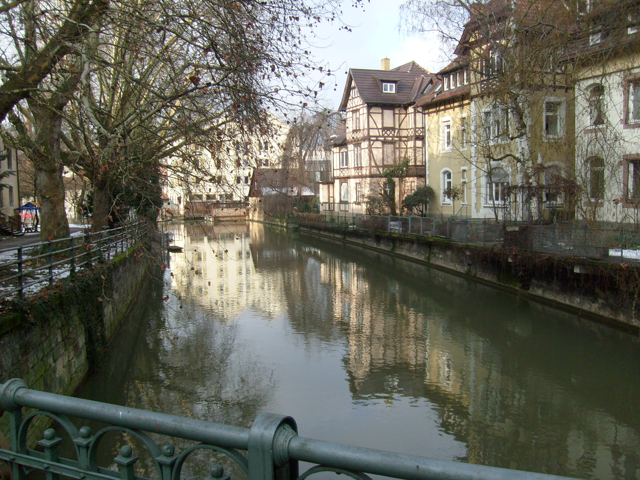 Ansicht des Hammerkanals, von der Brücke der Neckarstraße nach Nordwest